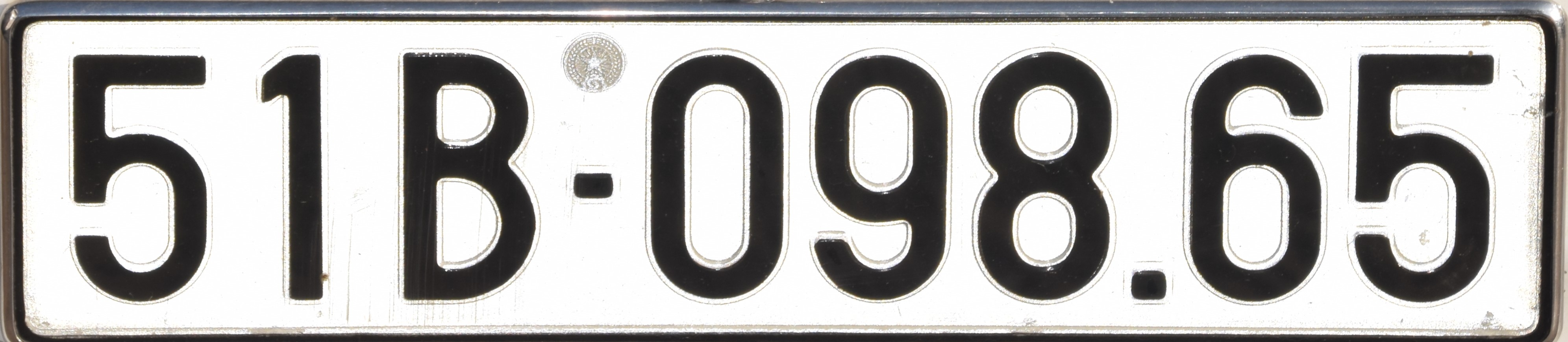 Bus kentekenplaat Vietnam